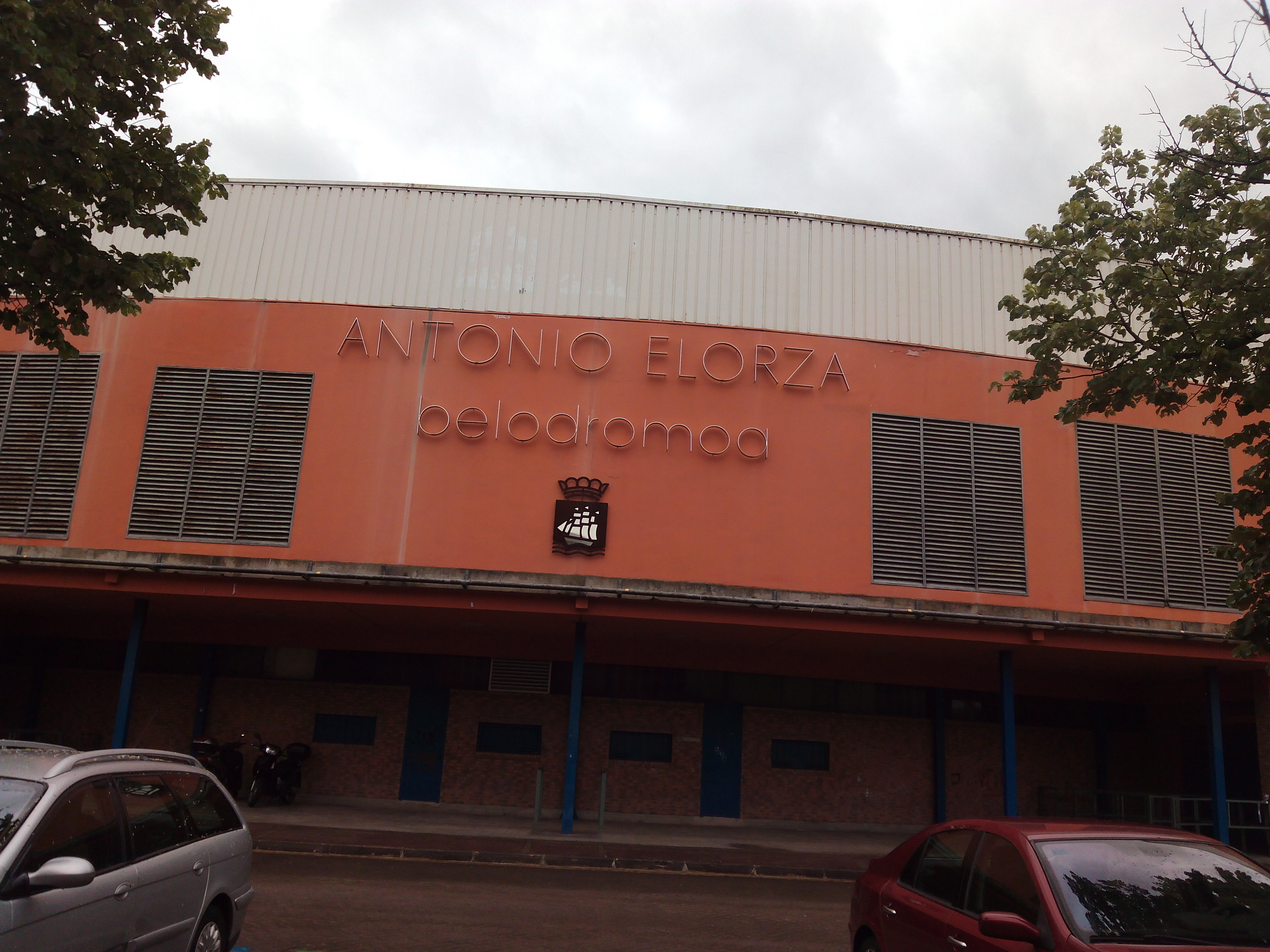 Antonio Elorza Belodromoa